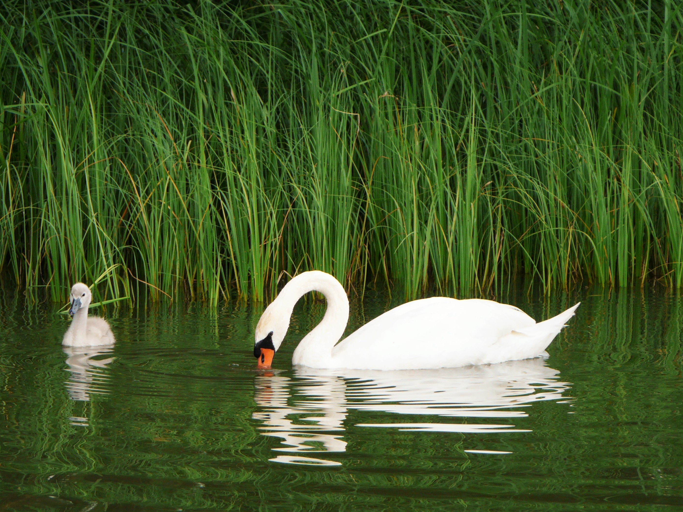 Obszar specjalnej ochrony ptaków: Puszcza Napiwodzko-Ramucka This is a photography of protected area with CRFOP ID PL.ZIPOP.1393.N2K.PLB280007.B